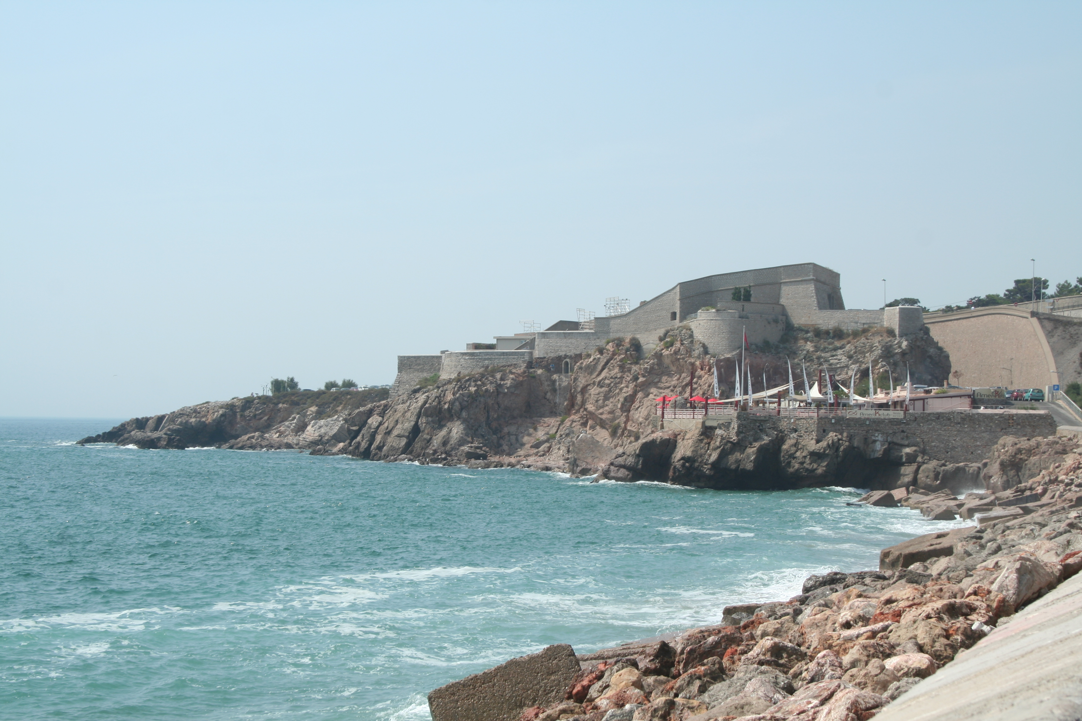 Sète (Hérault) - fort Saint-Pierre (1710-1711) construit par Antoine Niquet, aujourd'hui transformé en théâtre de la Mer.